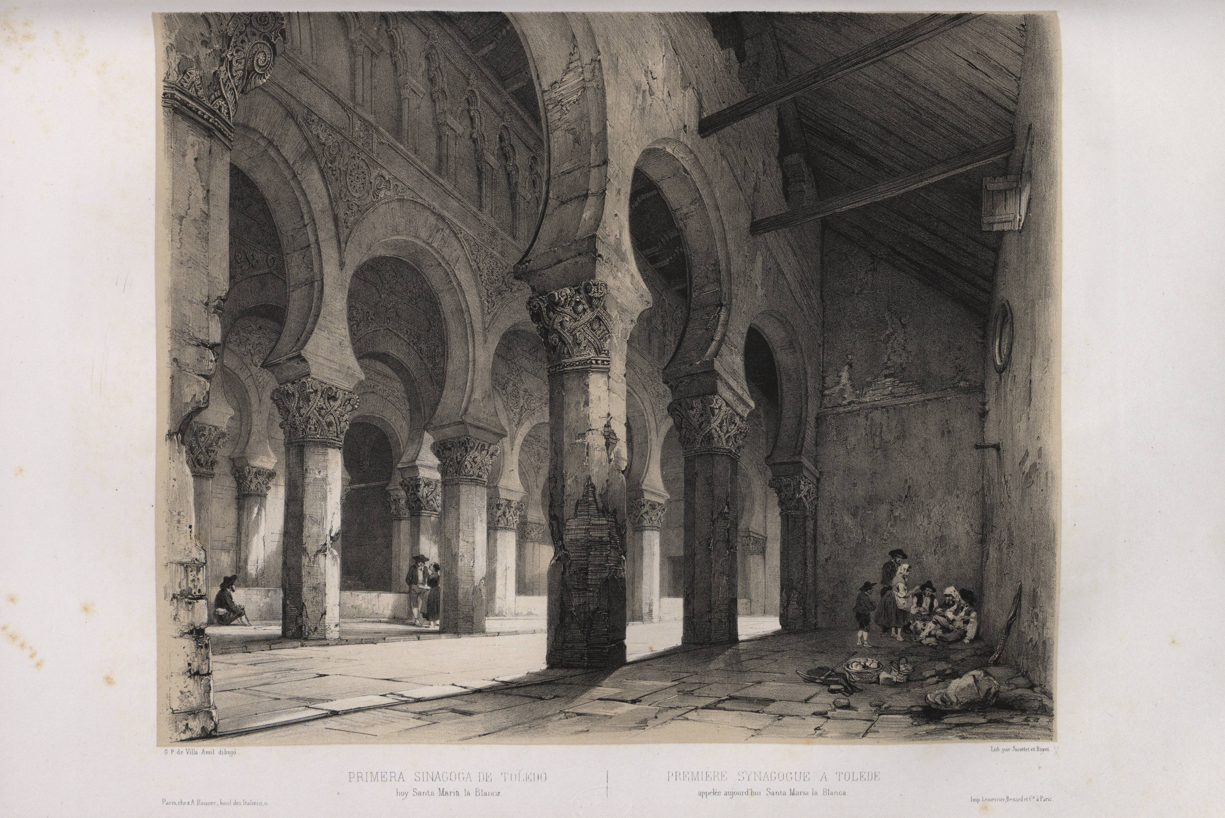 Primera sinagoga de Toledo hoy Santa María la Blanca.